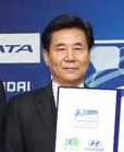 현대차 쏘나타 K-리그 2010 공식후원